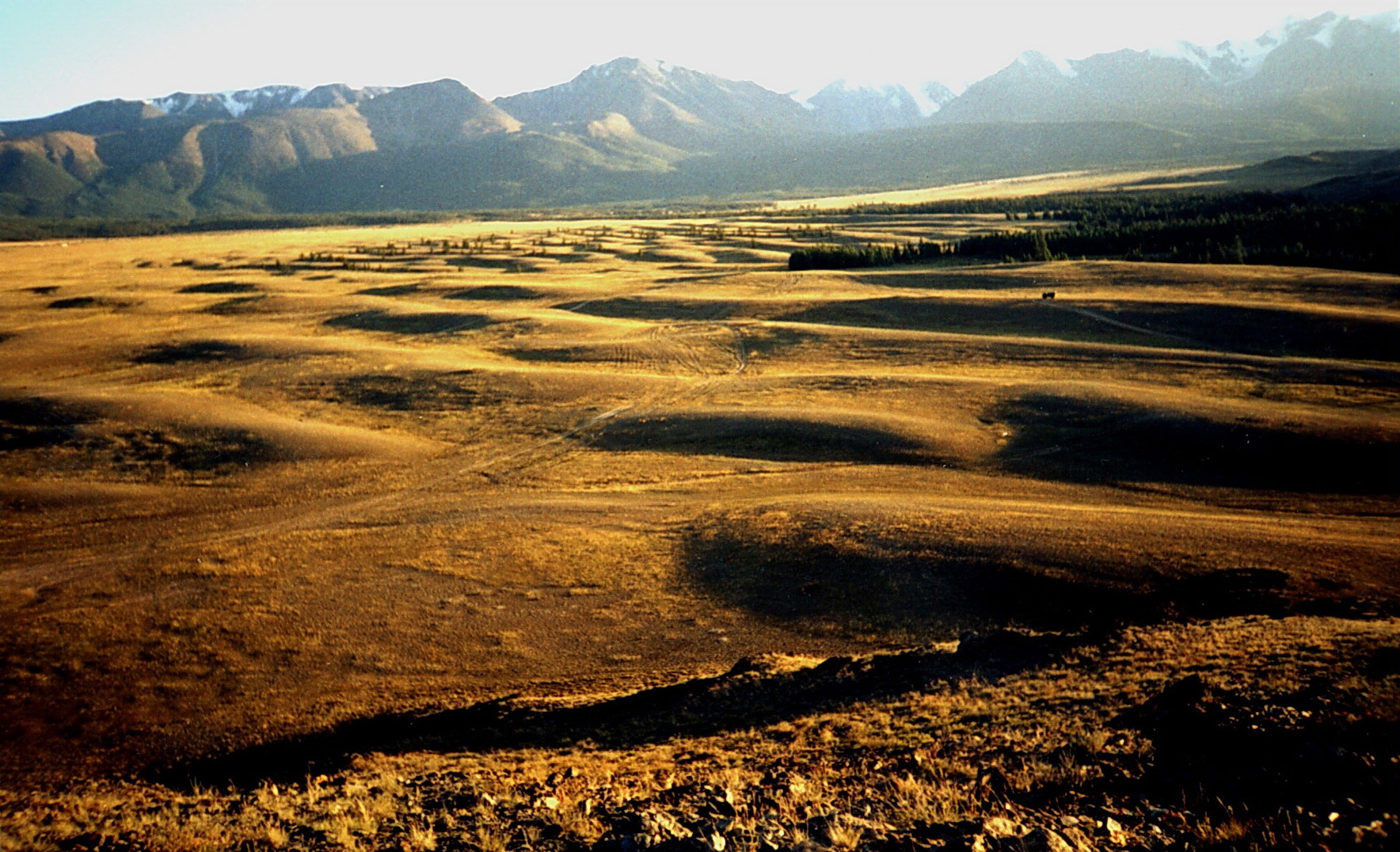 Дилювиальные гряды сложены грубогалечниково-валунной рыхлой косослоистой смесью с присутствием (около 5%)грубозернистых песков. Одно из самых эффектных в мире полей рельефа гигантской ряби течения, сформировавшегося при очередном прорыве Чуйско-Курайского ледниково-подрудного озера около 15 тыс. лет назад. Высота волны достигает 20 м при длине более 200 м, расходы дилювиальных потоков,в которых сформировалась рябь, превышали 1 млн. куб. м/сек, скорости потоков достигали десятков м/сек. На одной из гряд для масштаба установлен автомобиль ГАЗ-66. Горный Алтай.